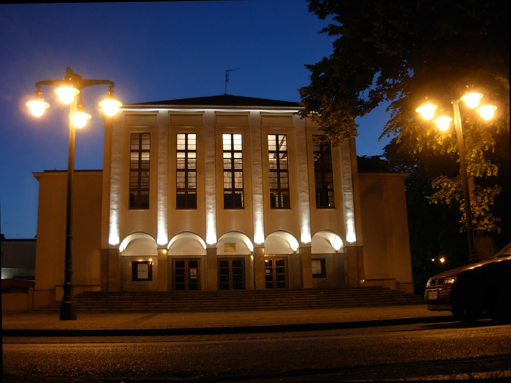 Teatr Polski w Bydgoszczy